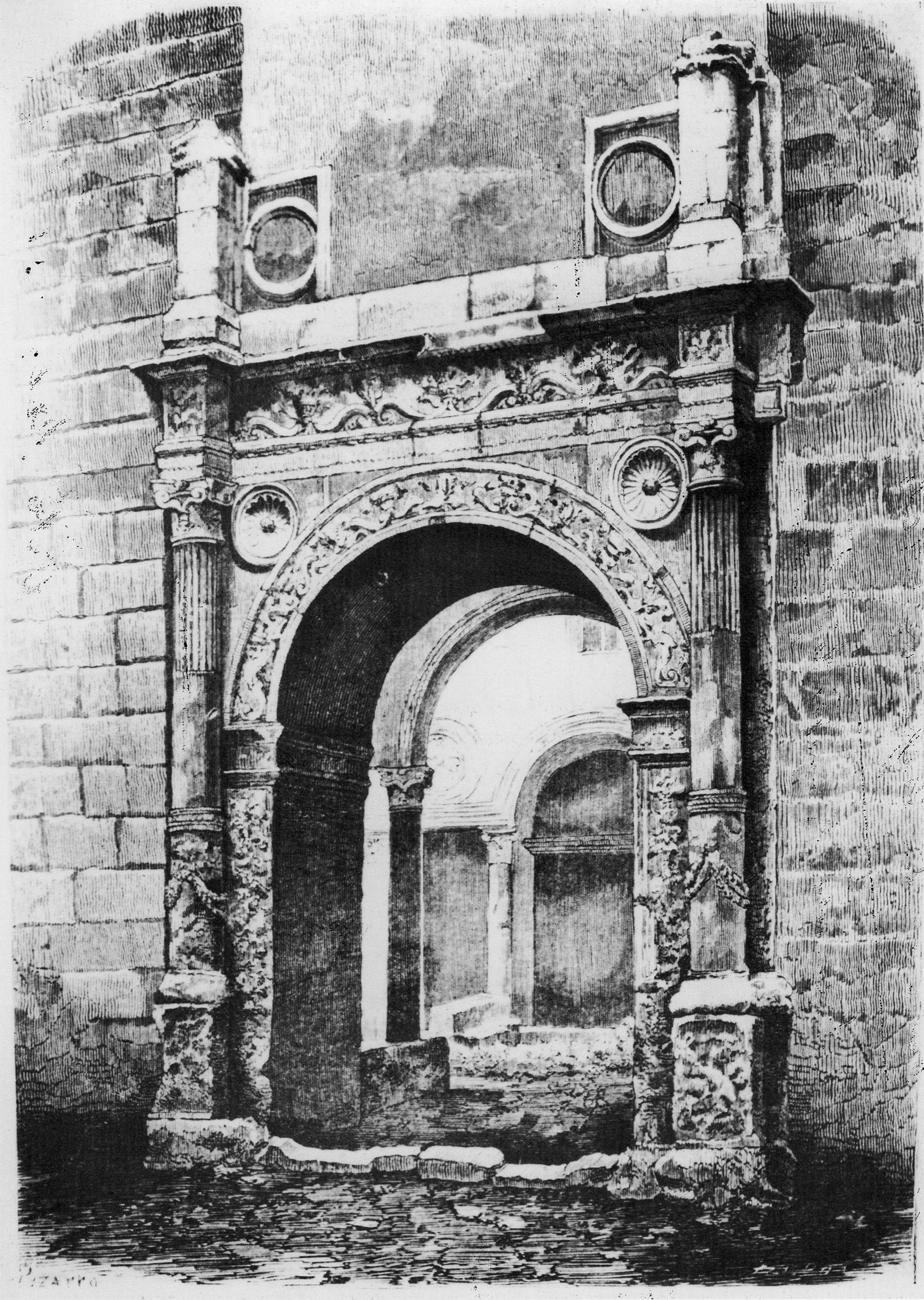 Portada del Palau Vich segons el gravat de Cecilio Pizarro publicat al Museo Universal en 1860.